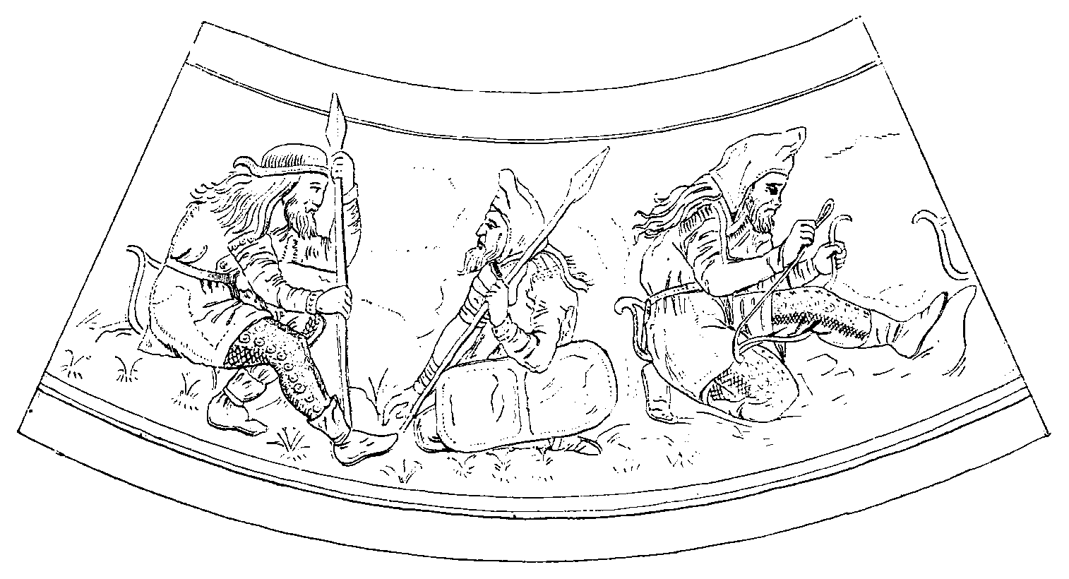 scythes armés de lances, d’après le vase de kul-oba